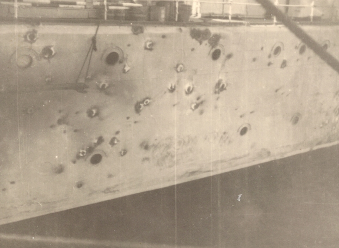 סימני פגיעות התותחים בדופן שמאל של איבראהים אל-אוואל אוקטובר 1956